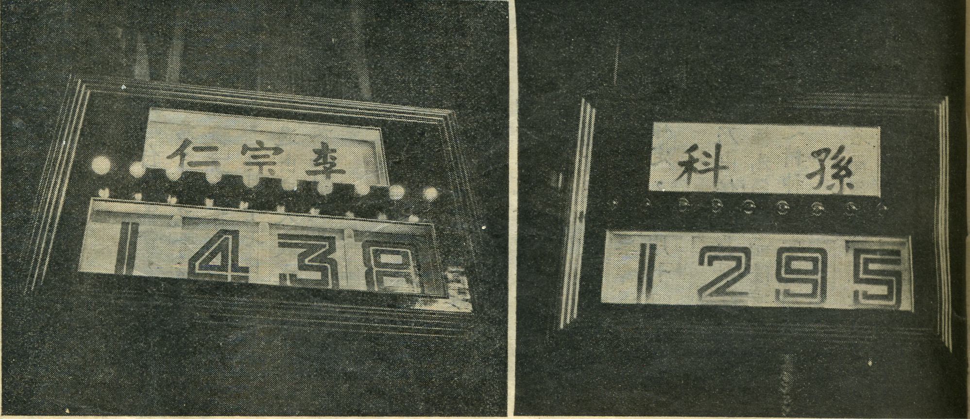 中華民國第一屆國民大會第一次會議，副總統候選人李宗仁所得票數1438票，副總統候選人孫科所得票數1295票。